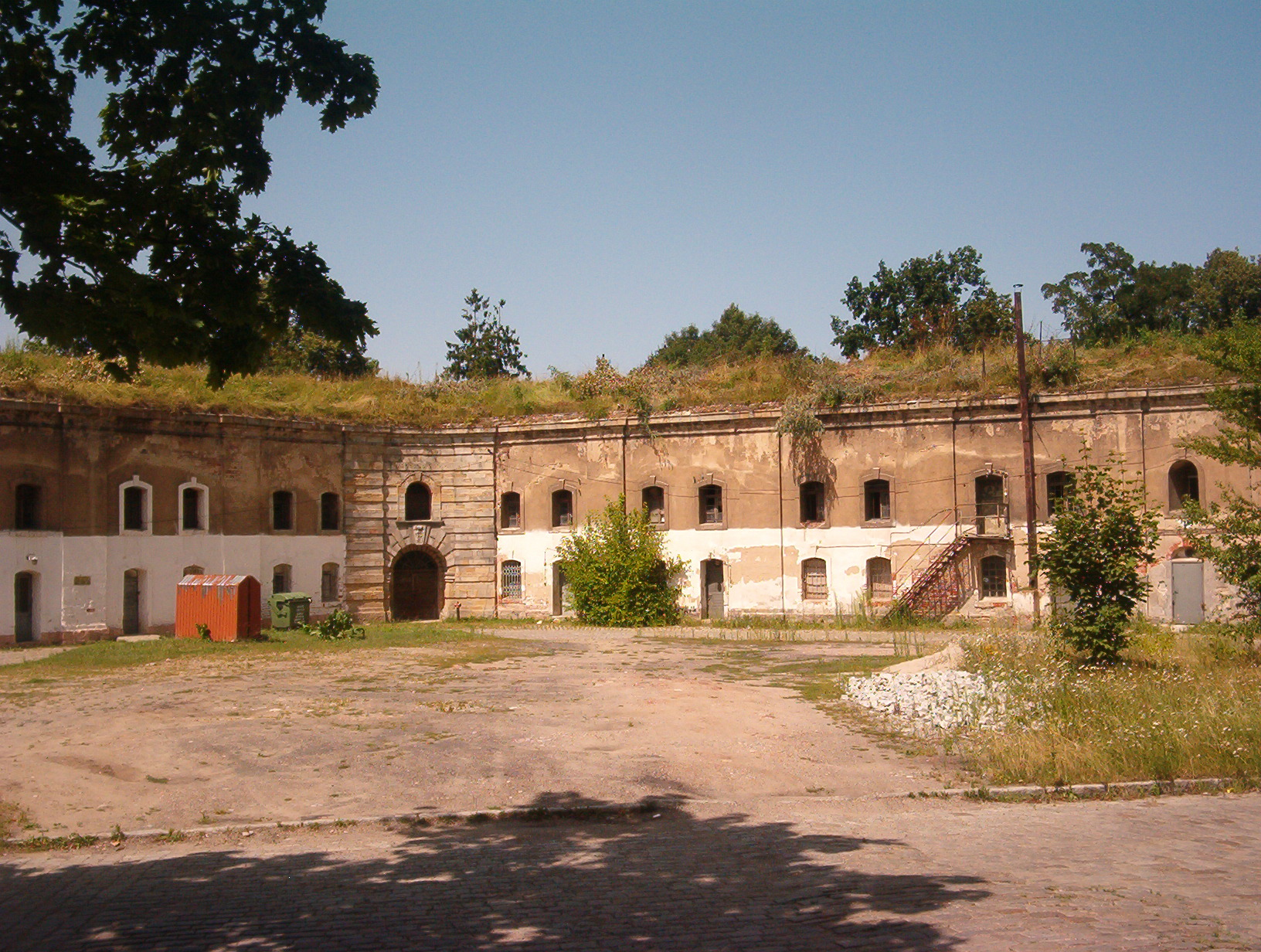 Festung Neisse - Twierdza Nysa